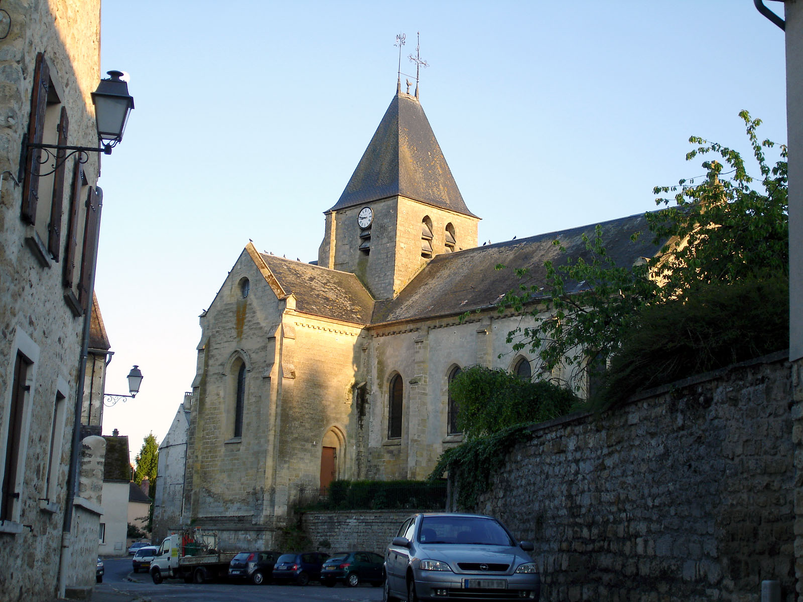 L'église d'Us, Val-d'Oise, France.